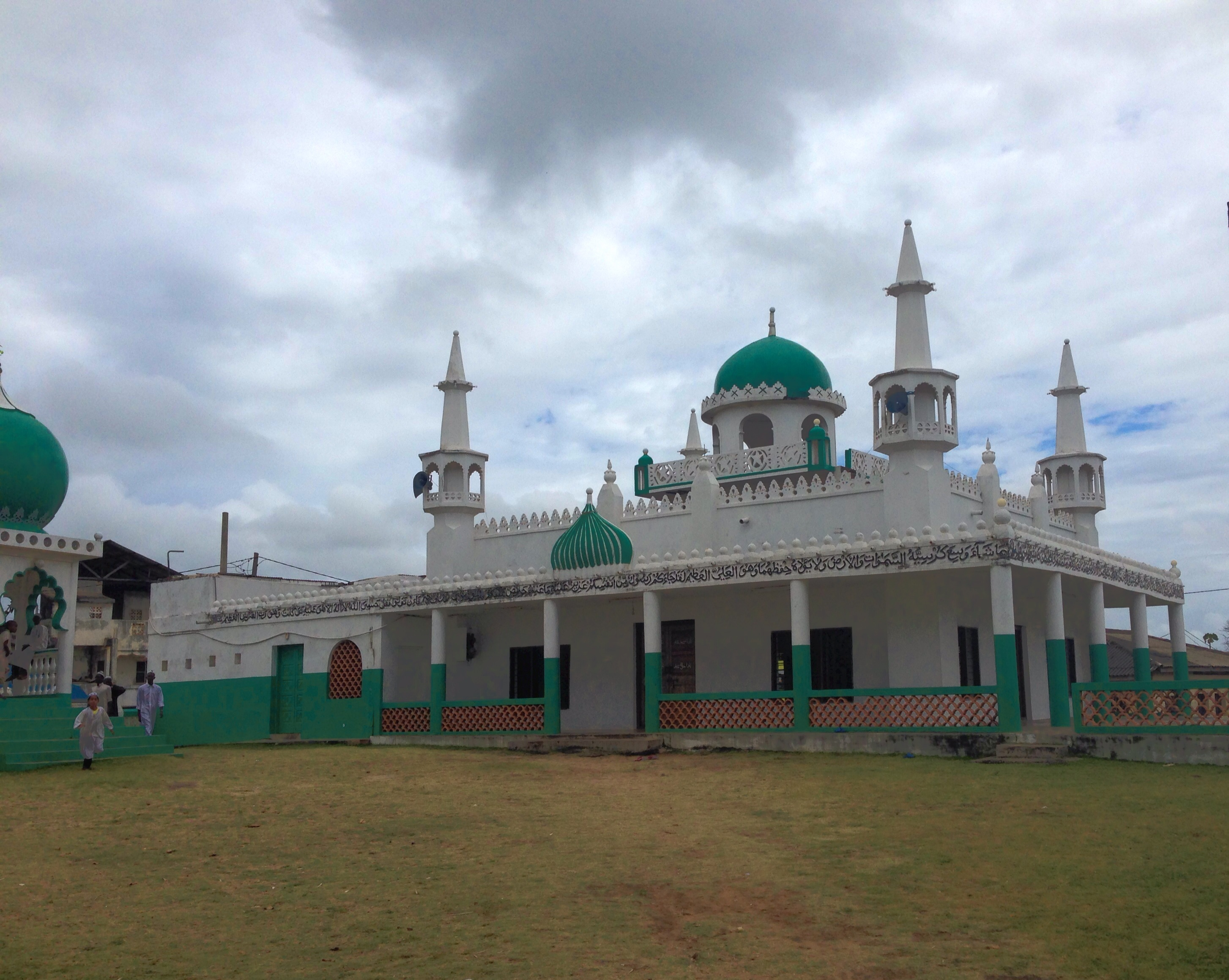 Mambrui - Jumaa